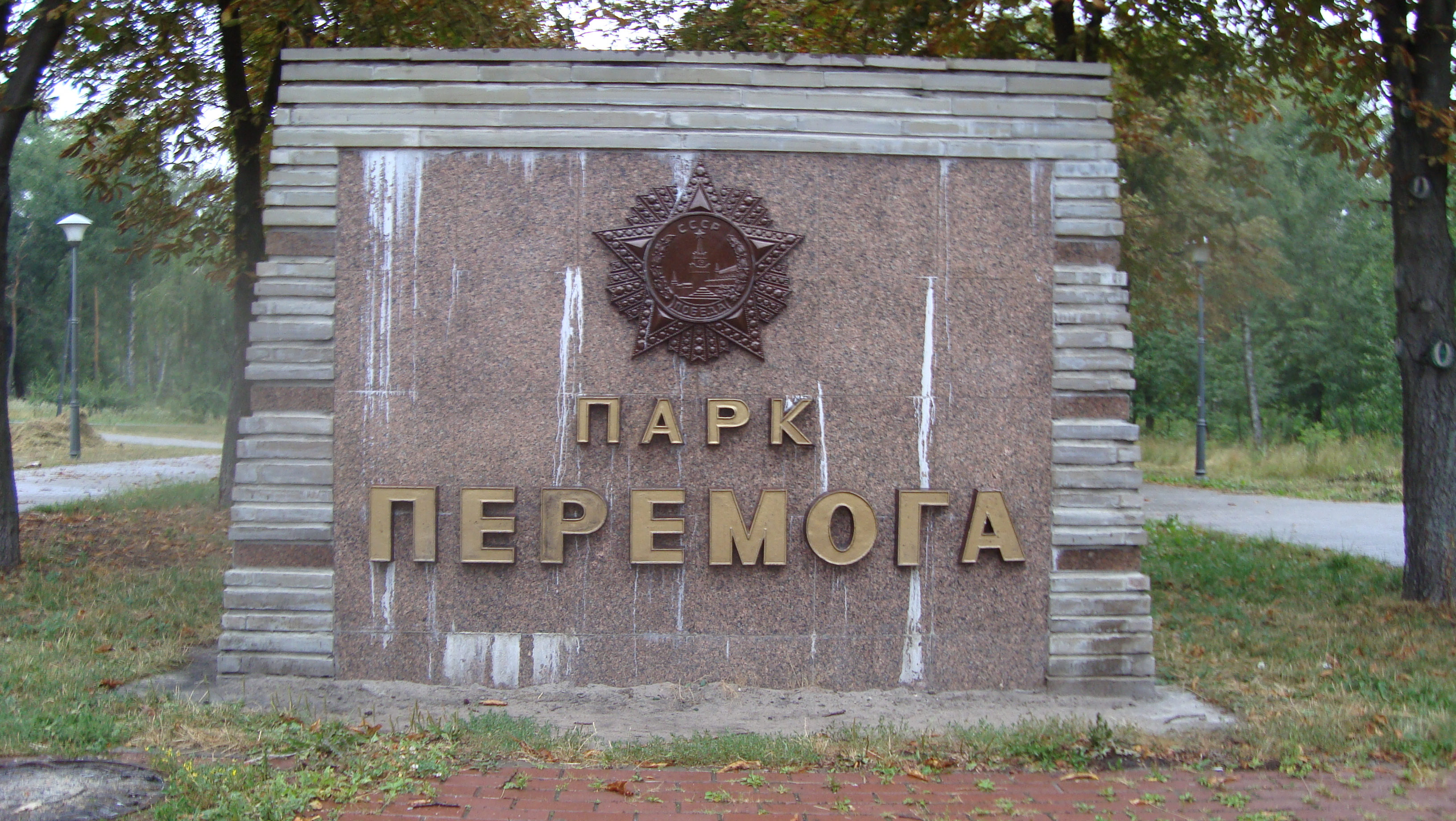 Вхід до парку "Перемога", Київ